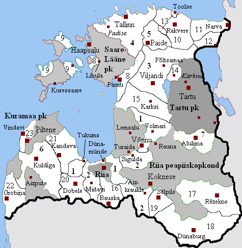 Liivi ordu valdused 1530. aastate seisuga